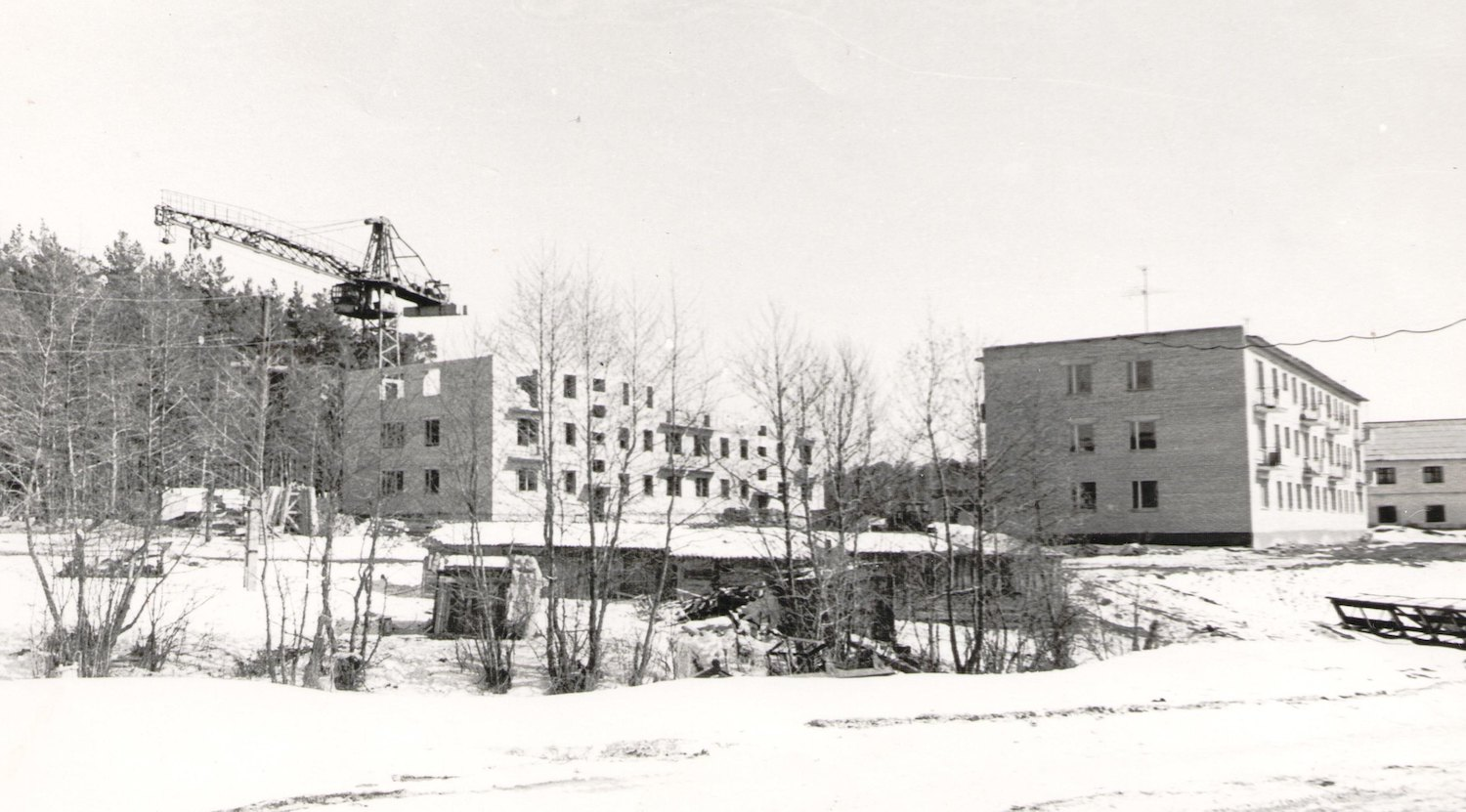 Строительство жилых домов на улице Дружбы в посёлке Мирный